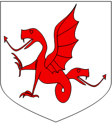 D'argent à une amphisbène de gueules